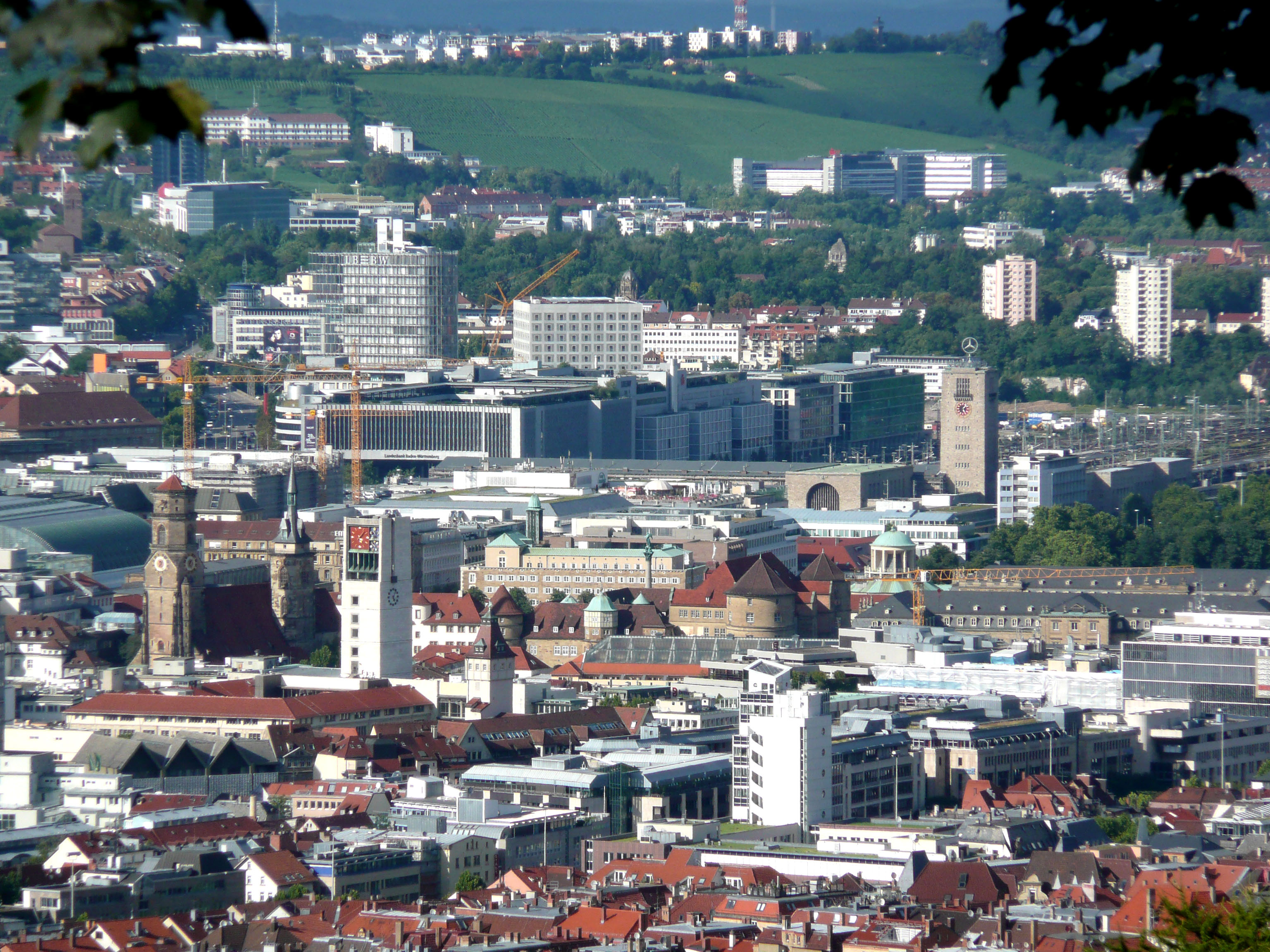 Stuttgart, Innenstadt, Hauptbahnhof